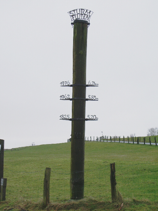 Sturmflutmast am Haseldorfer Hafen, selbst fotografiert.